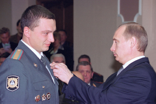 МОСКВА. Посещение Управления Государственной инспекции безопасности дорожного движения (ГИБДД) ГУВД Москвы. Вручение государственных наград и ценных подарков сотрудникам ГИБДД. Медаль «За отличие в охране общественного порядка» вручается старшине милиции Геннадию Боброву.